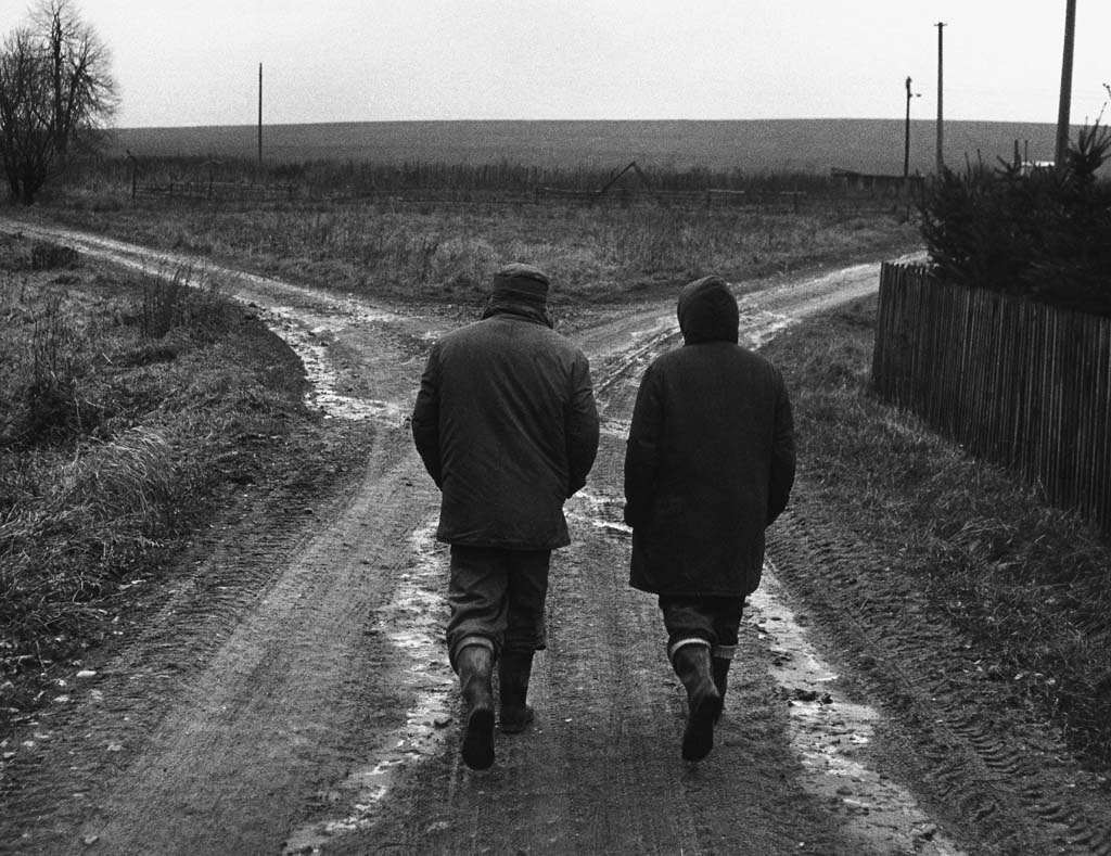 Jindřich Štreit´s archive